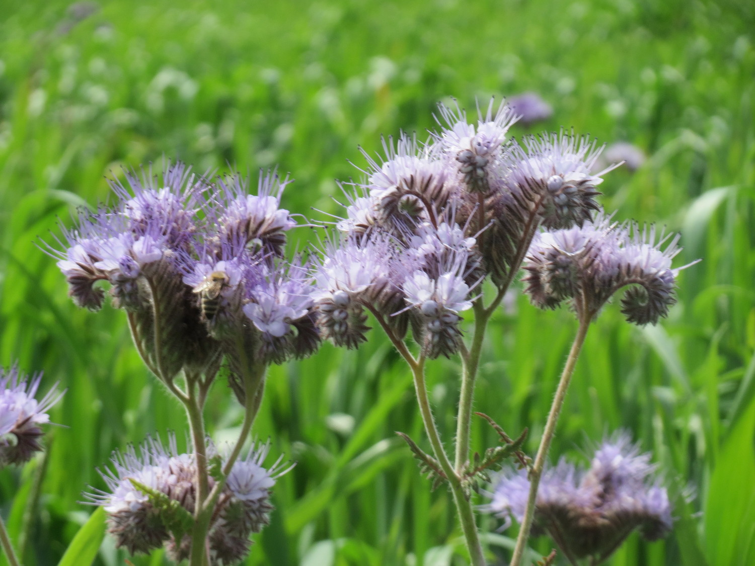 Rainfarn-Phazelie (Phacelia tanacetifolia) im Landschaftsschutzgebiet „Hockenheimer Rheinbogen“ - invasiv als Acker-Flüchtling